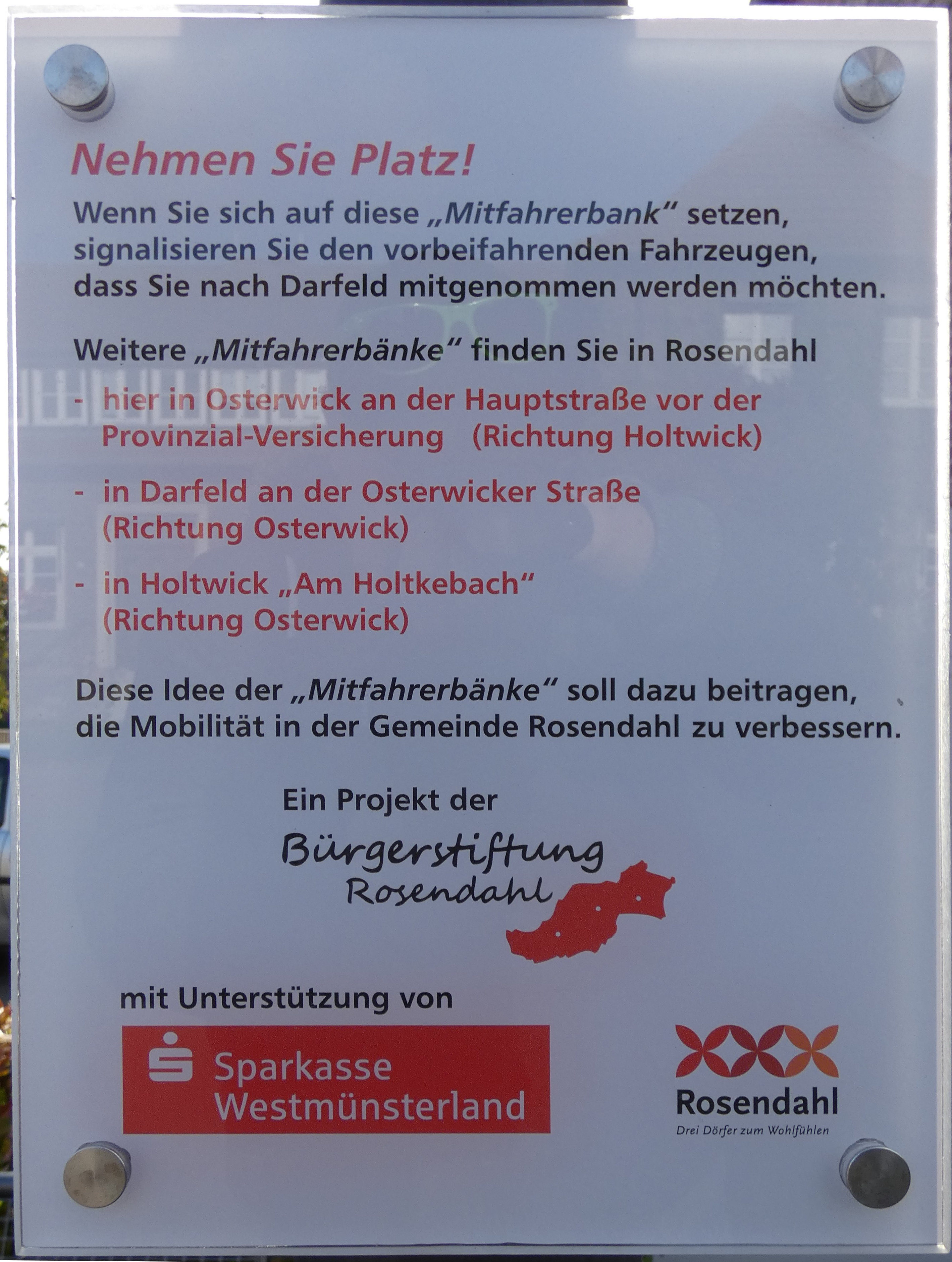 Schild Mitfahrerbank in Rosendahl-Osterwick, Kreis Coesfeld, NRW, Deutschland